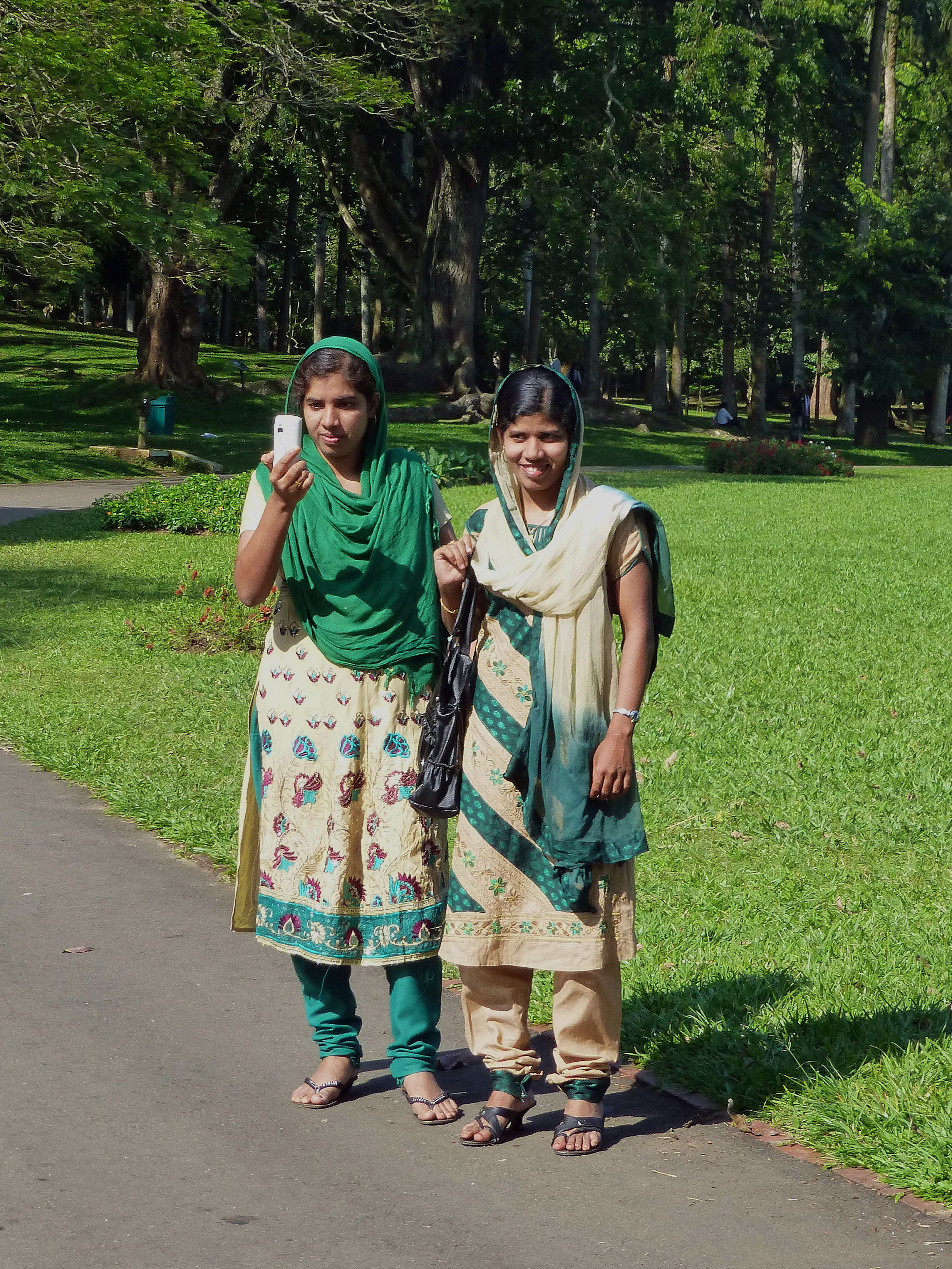 Jeunes filles au Jardin botanique de Kandy (Sri Lanka)